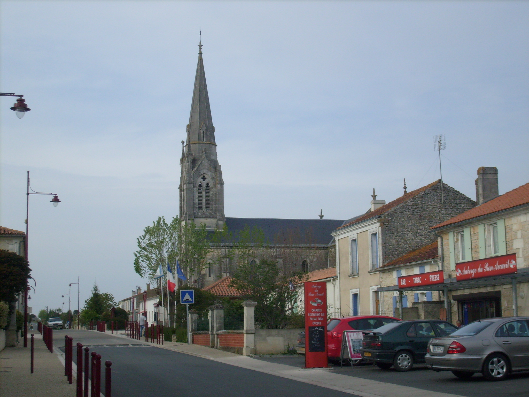 Le bourg de Trizay